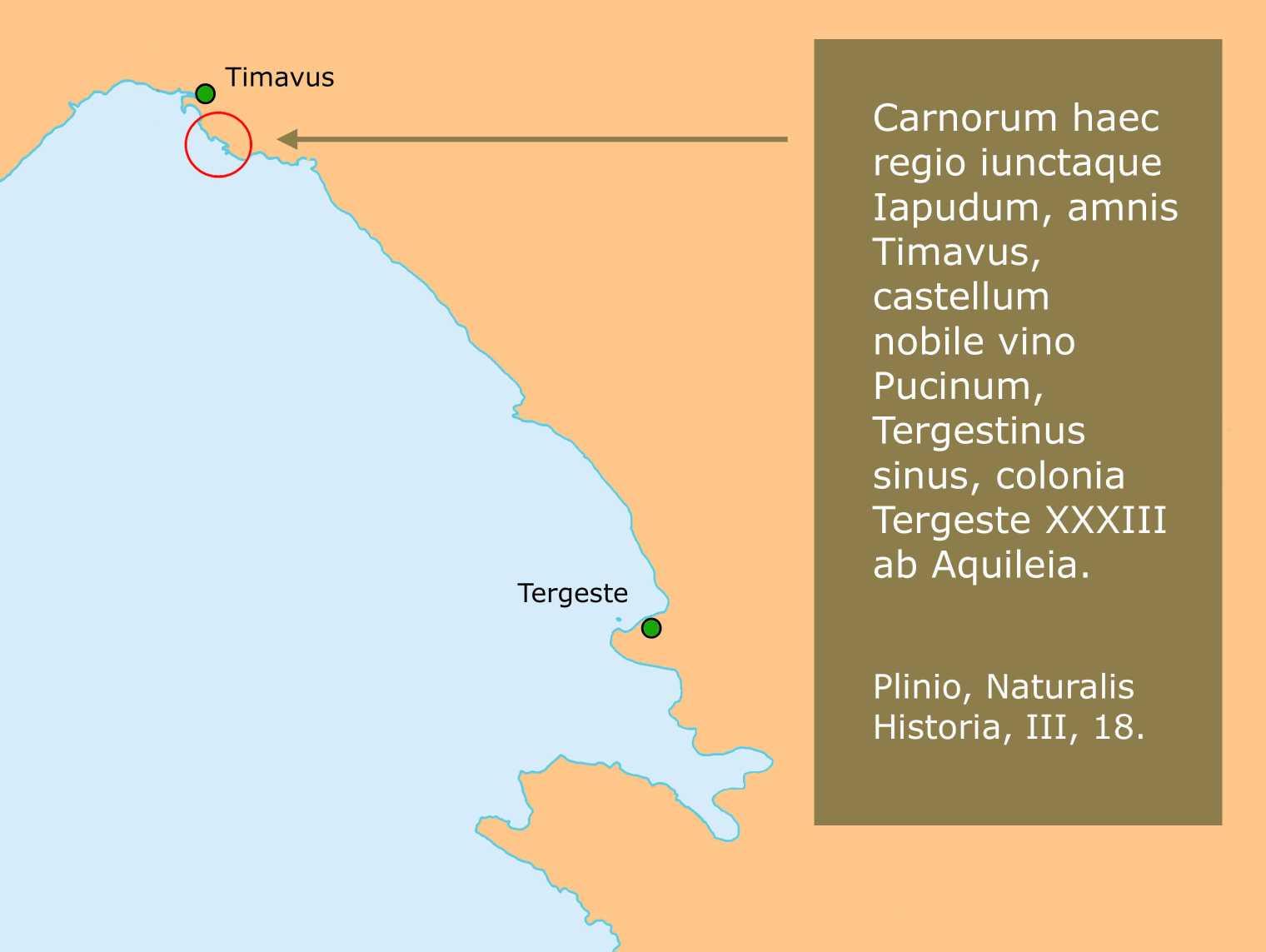 Ubicazione del Castellum Pucinum (Plinio NH, III, 18)